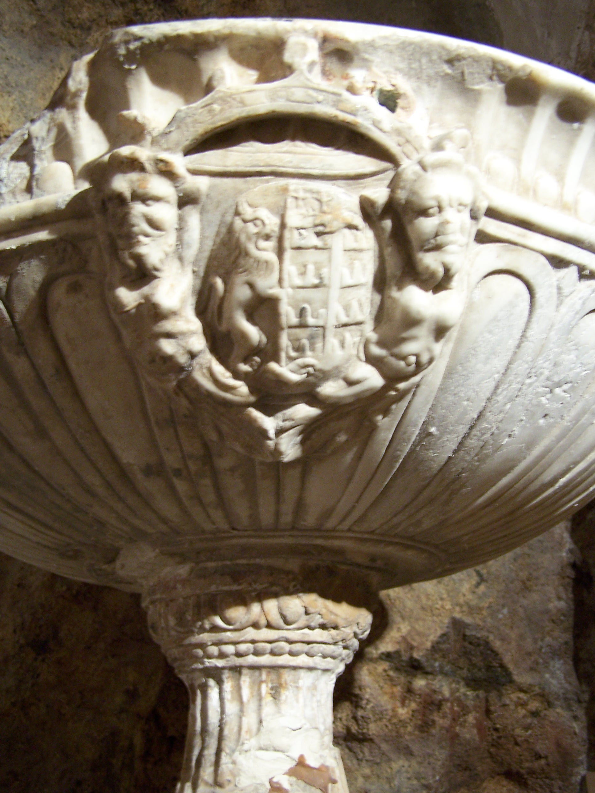 Acquasantiera di S. Nicolò il Vecchio con lo stemma delle famiglie Branciforte e Barresi (sec. XVI). Militello